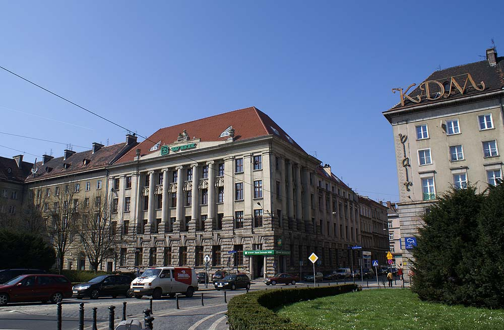 Wrocław Stare Miasto, plac Kościuszki 7-8 - budynek banku, obecnie Wielkopolski Bank Kredytowy